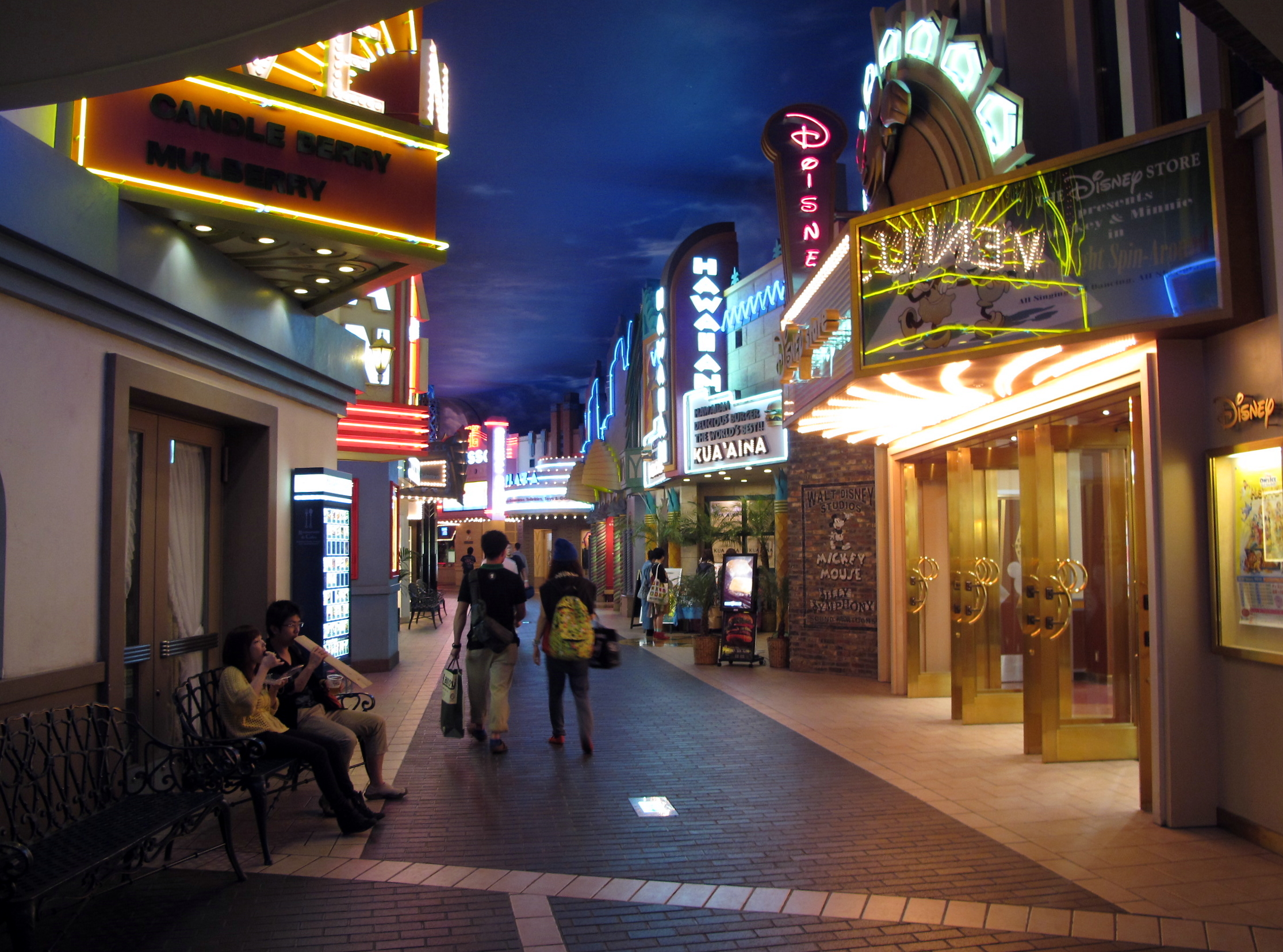 Ikspiari Level 2